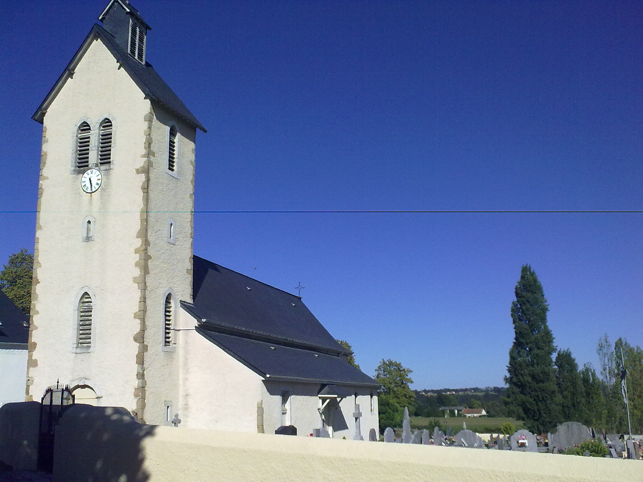 Saint-Armou le 30 août 2010, France.